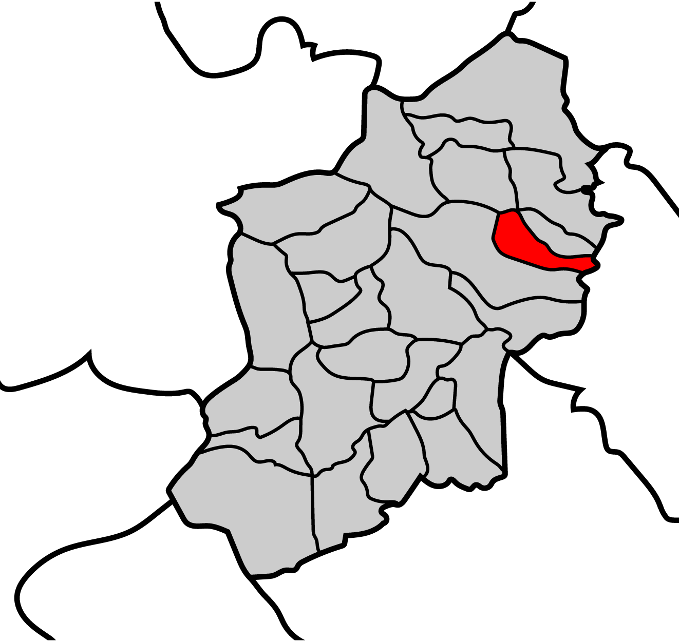 Mapa de la parroquia de Veiga ayuntamiento de Becerreá